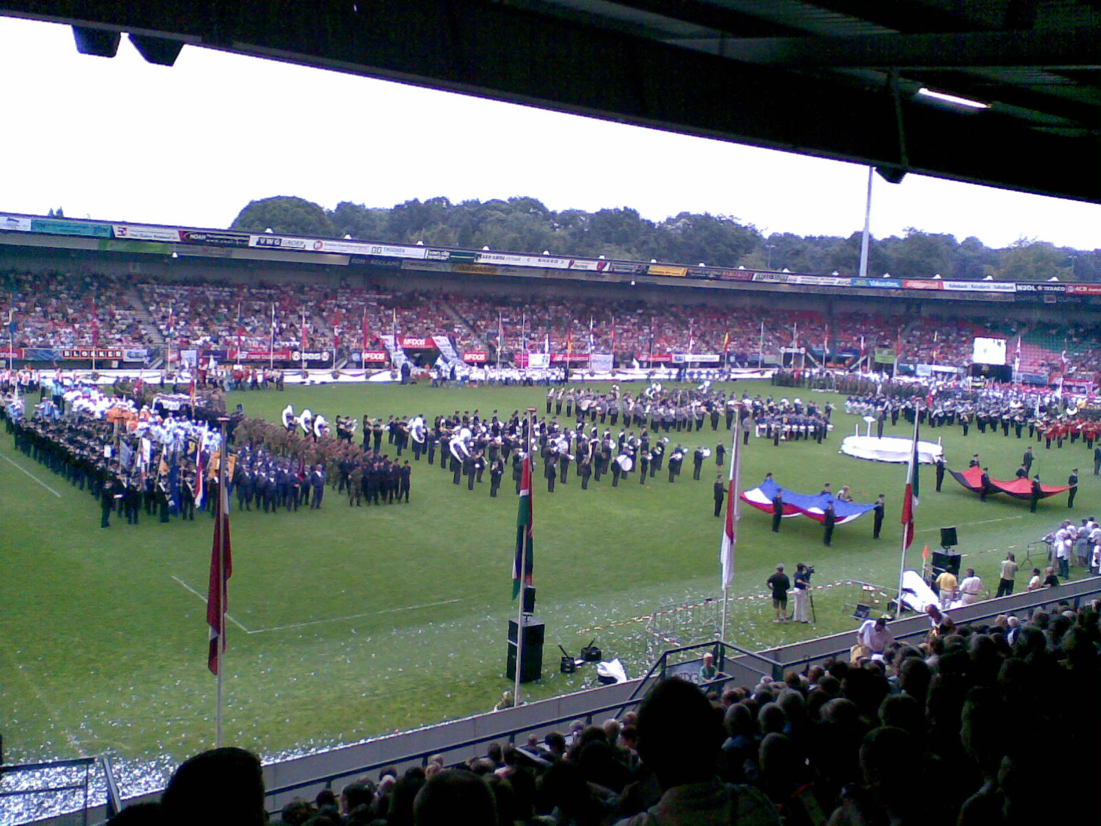 The 2007 "Vlaggenparade" (Flag Parade) in Nijmegen